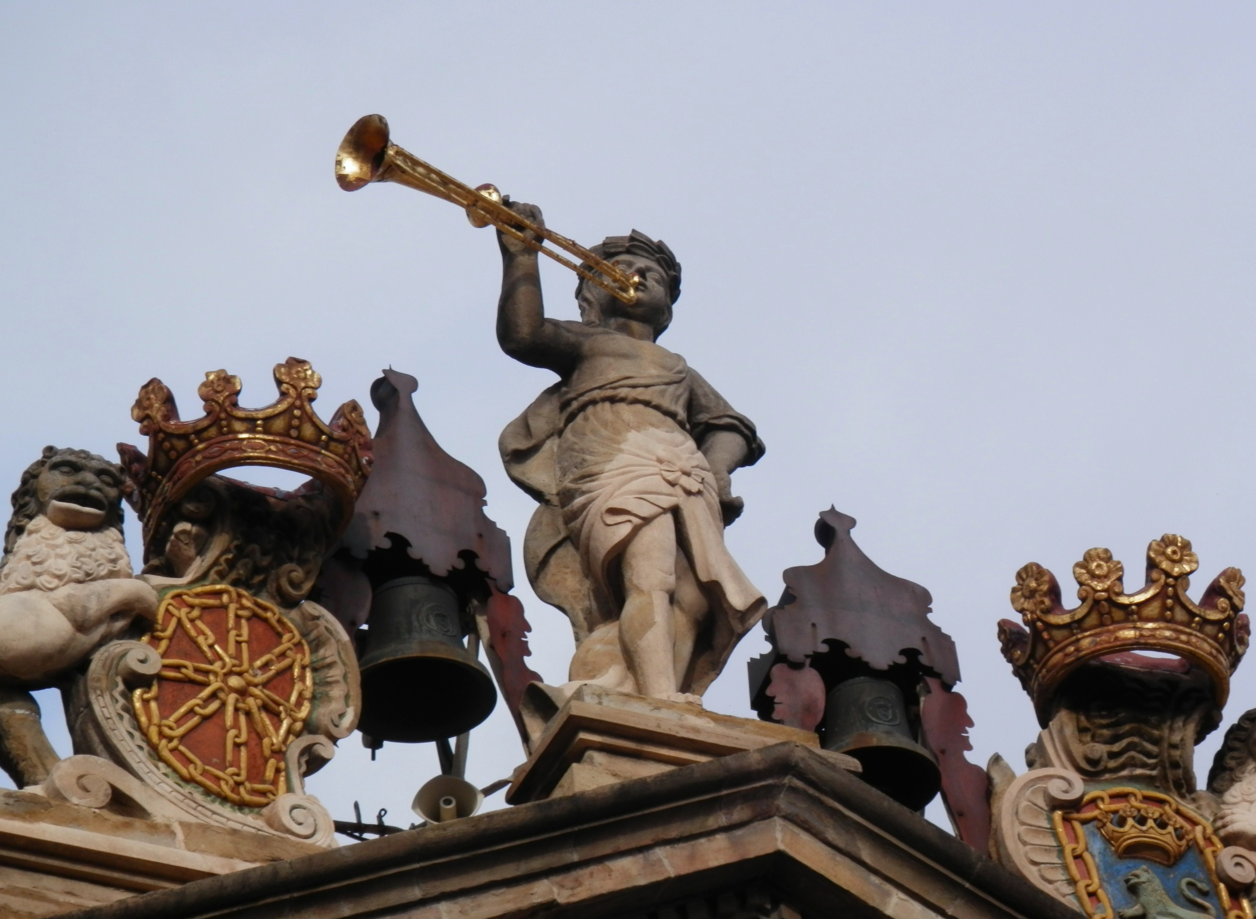 Al·legoria de la Fama, ajuntament de Pamplona.